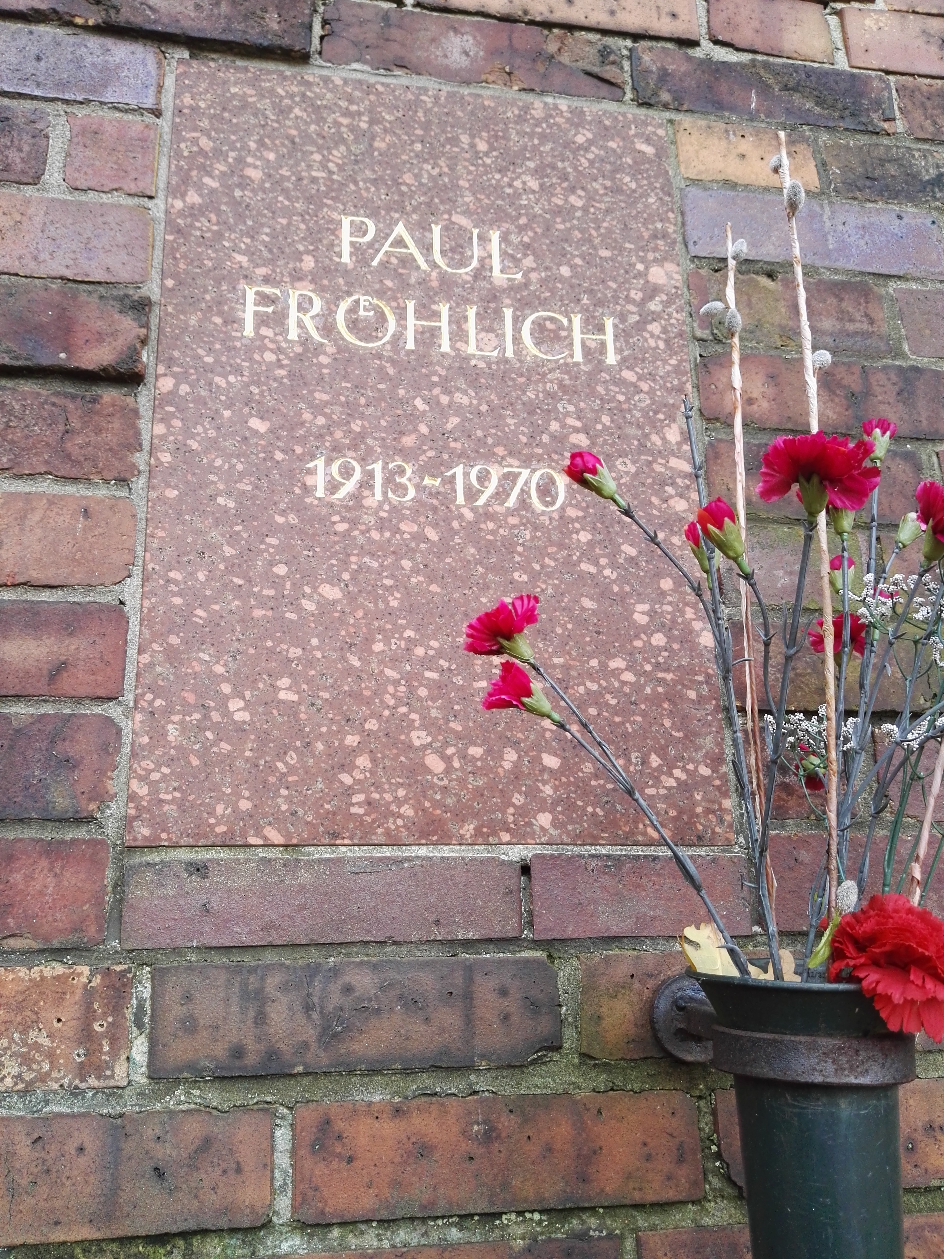 Grab von Paul Fröhlich in der Gedenkstätte der Sozialisten auf dem Zentralfriedhof Friedrichsfelde in Berlin-Lichtenberg